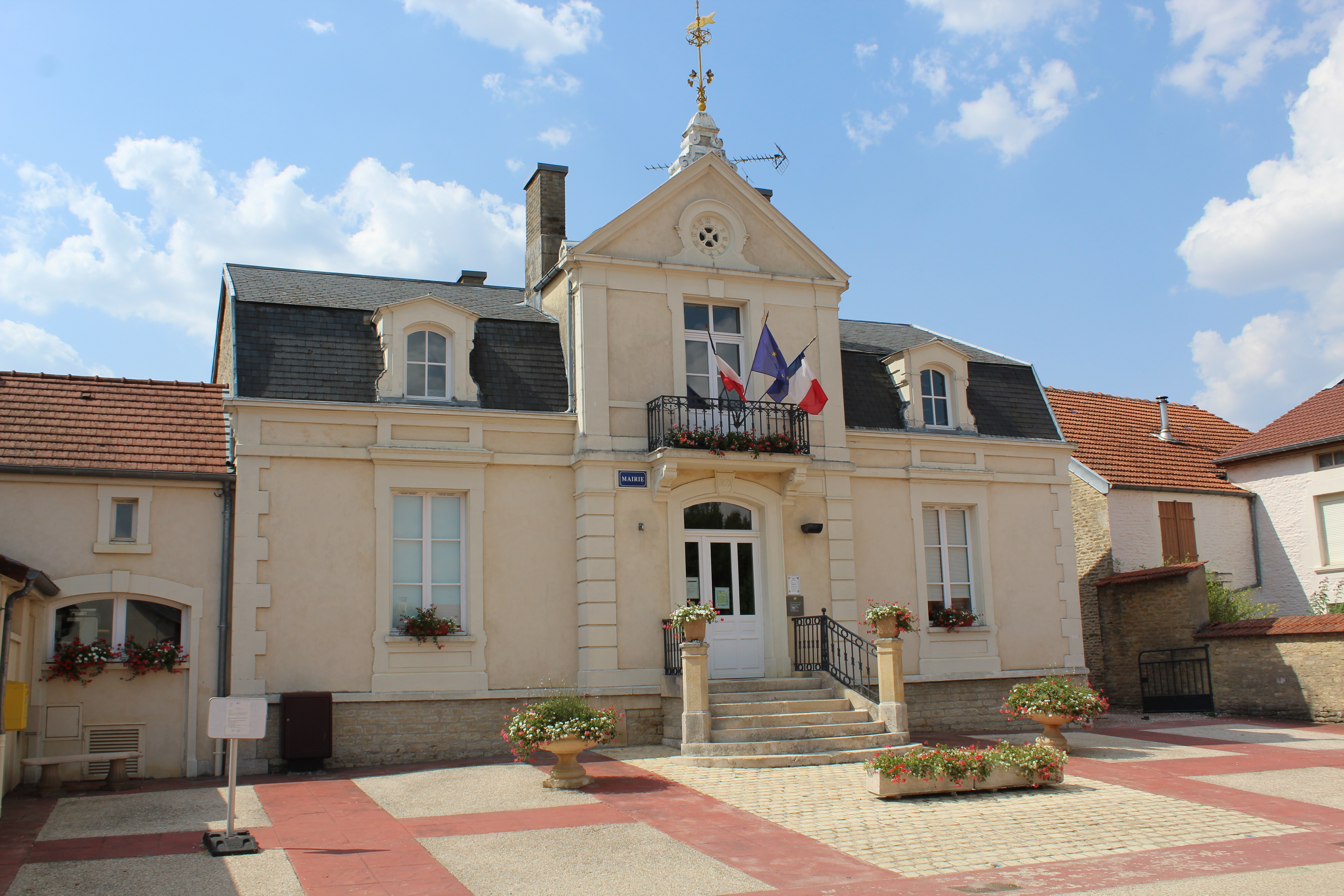 La mairie